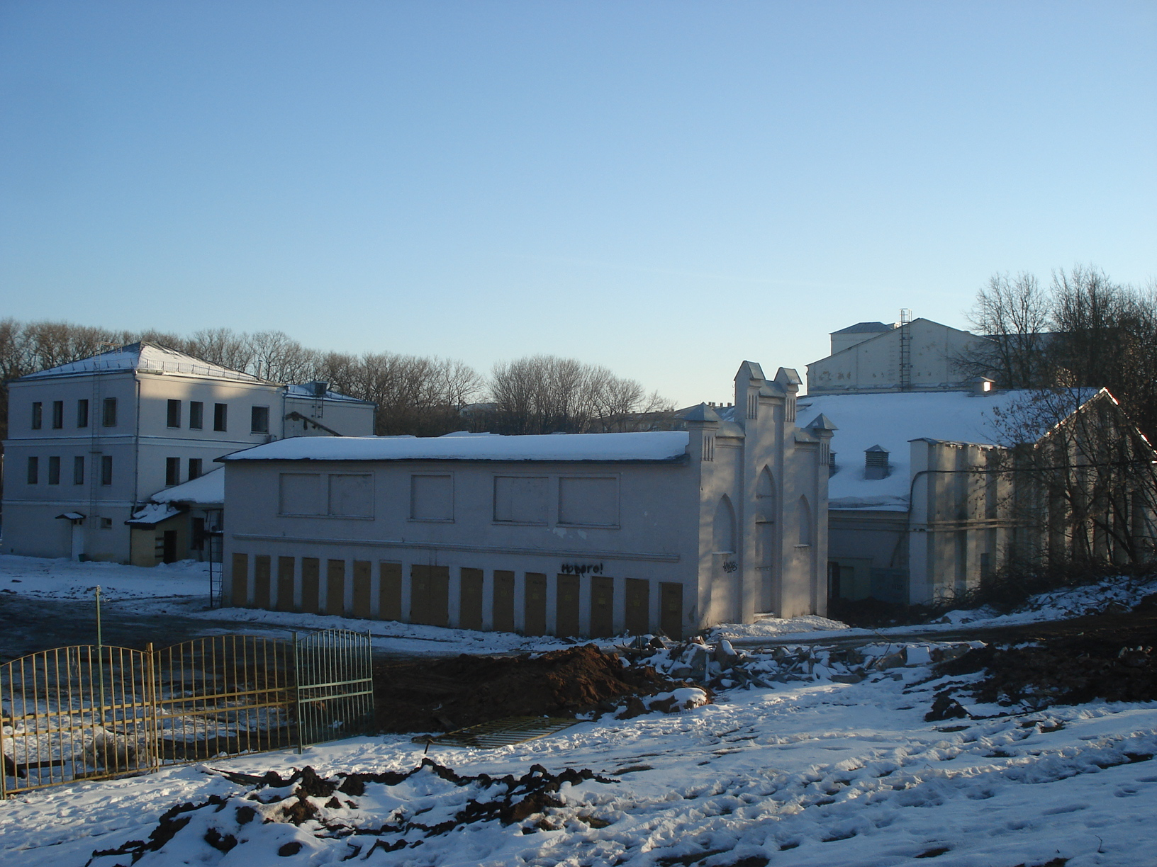 Беларуская (тарашкевіца): Першая менская электрастанцыя